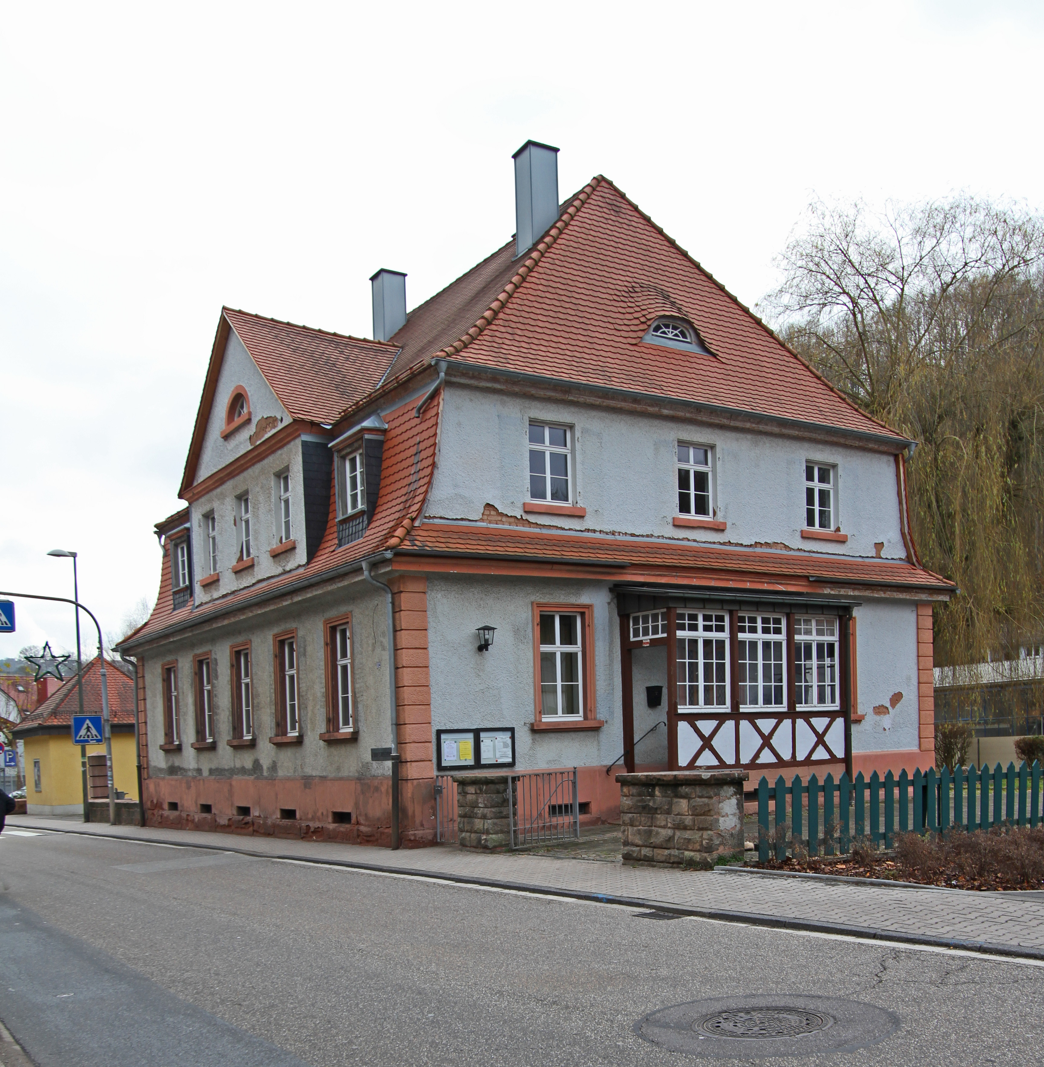 Waldfischbach